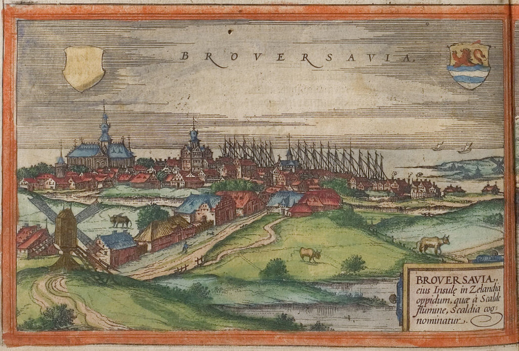 Brouwershaven